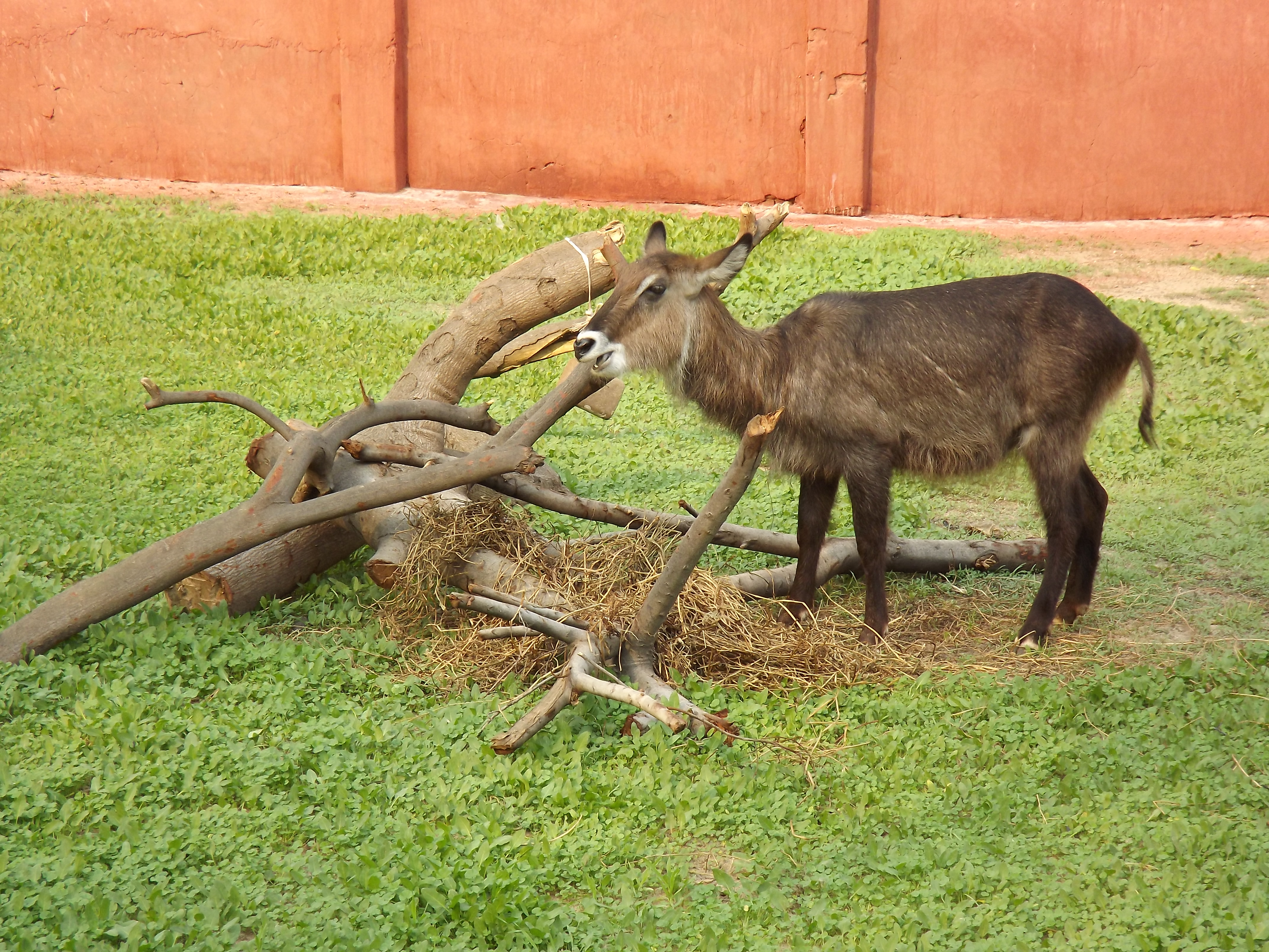 كتمبورا في حديقة حيوان النزهة - الاسكندرية